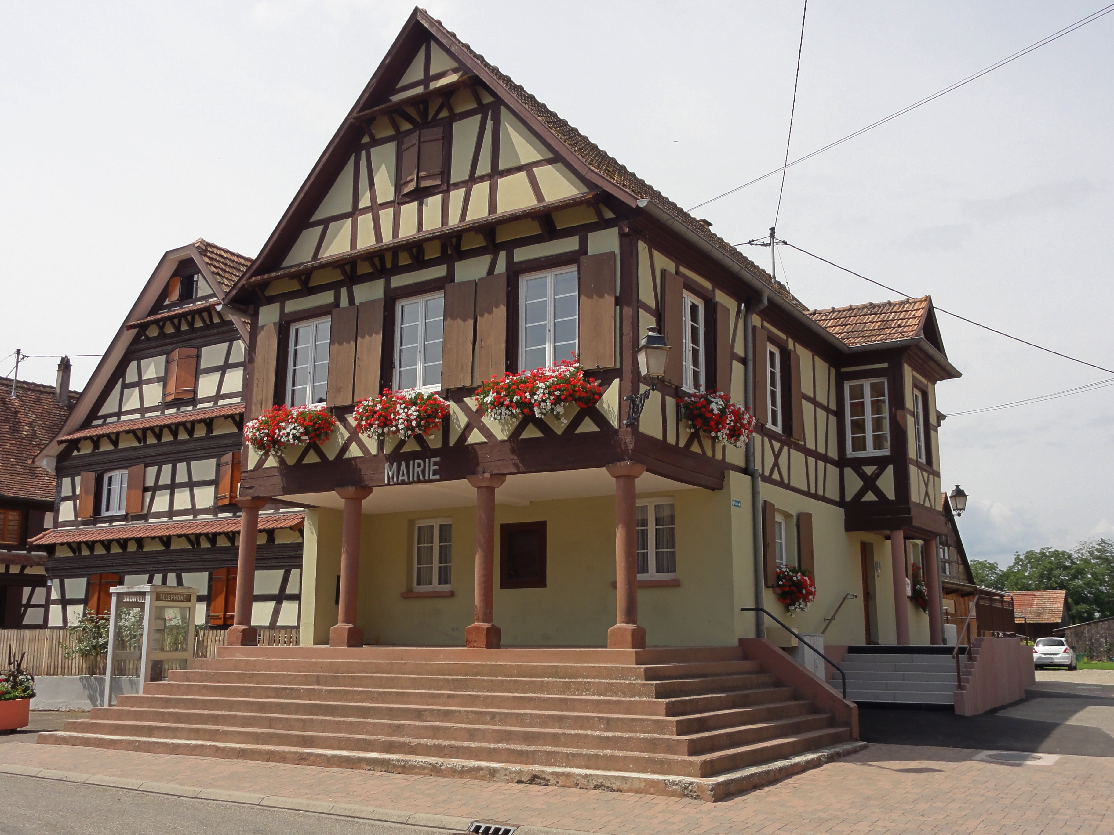 Alsace, Bas-Rhin, Uttenheim, Mairie (XIXe), rue Principale. .